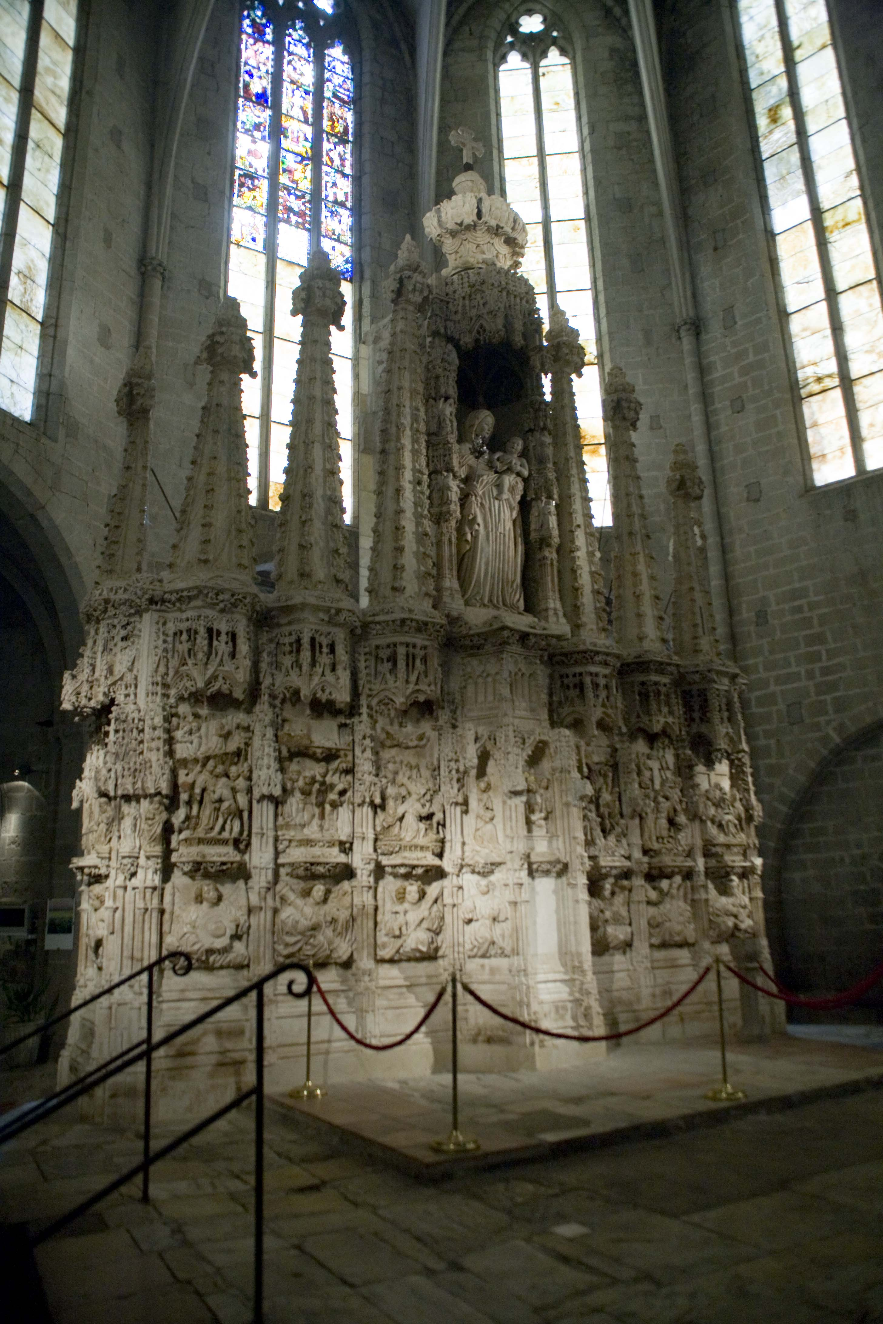 Retaule de la catedral de Castelló d'Empúries.